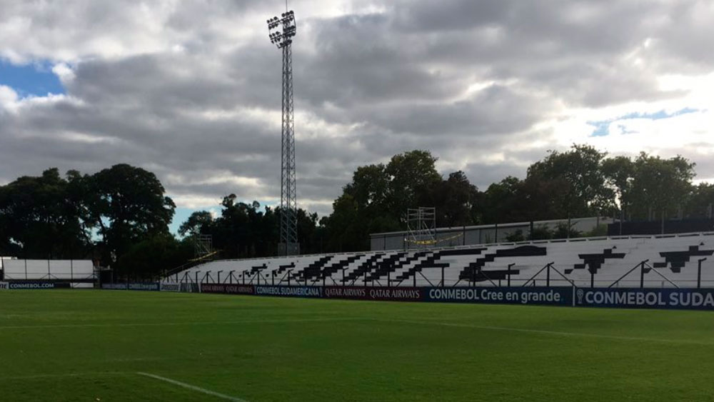 Estadio parque alfredo victor viera de MWFC